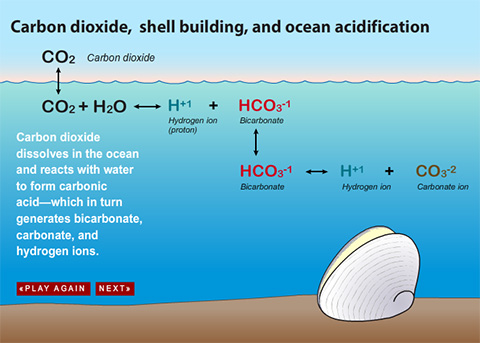 Сликовито прикажување на ацидификација на океаните